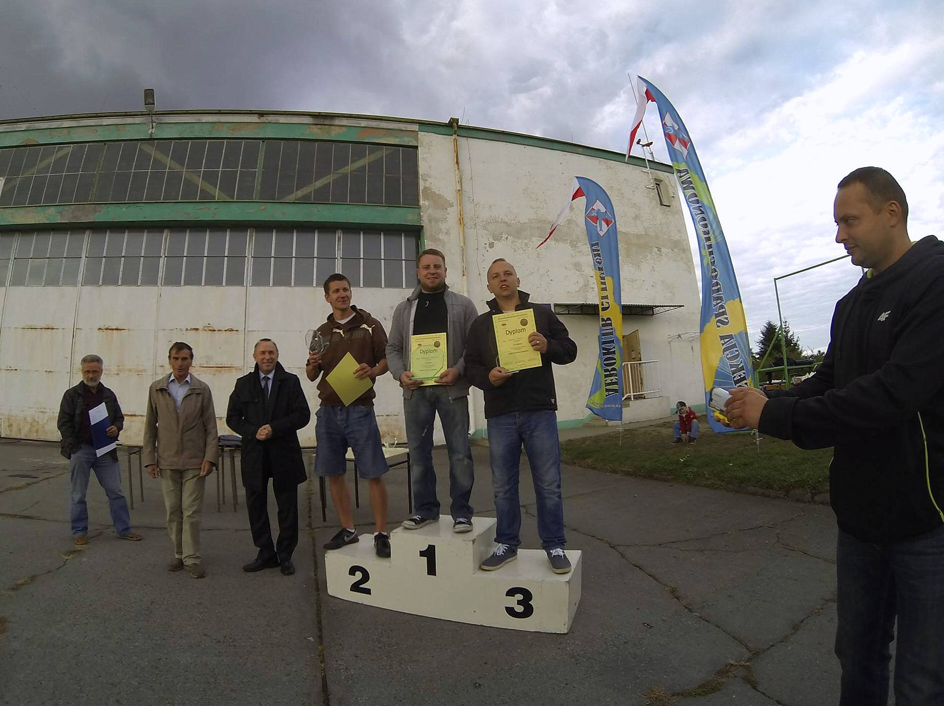 Spadochronowe Mistrzostwa Śląska 2015, zwycięży kategorii spadochrony szkolne: I miejsce – Aleksander Piecha, II miejsce – Adam Bernacki, III miejsce – Jarosław Deręcz. Od lewej stoją: 1. Ryszard Ptaszek (Szef wyszkolenia Aeroklubu Gliwickiego), 2. Jan Isielenis (Kierownik sportowy Mistrzostw), 3. Bogdan Traczyk (Prezes Zarządu Aeroklubu Gliwickiego). Po prawej Paweł Mostowski